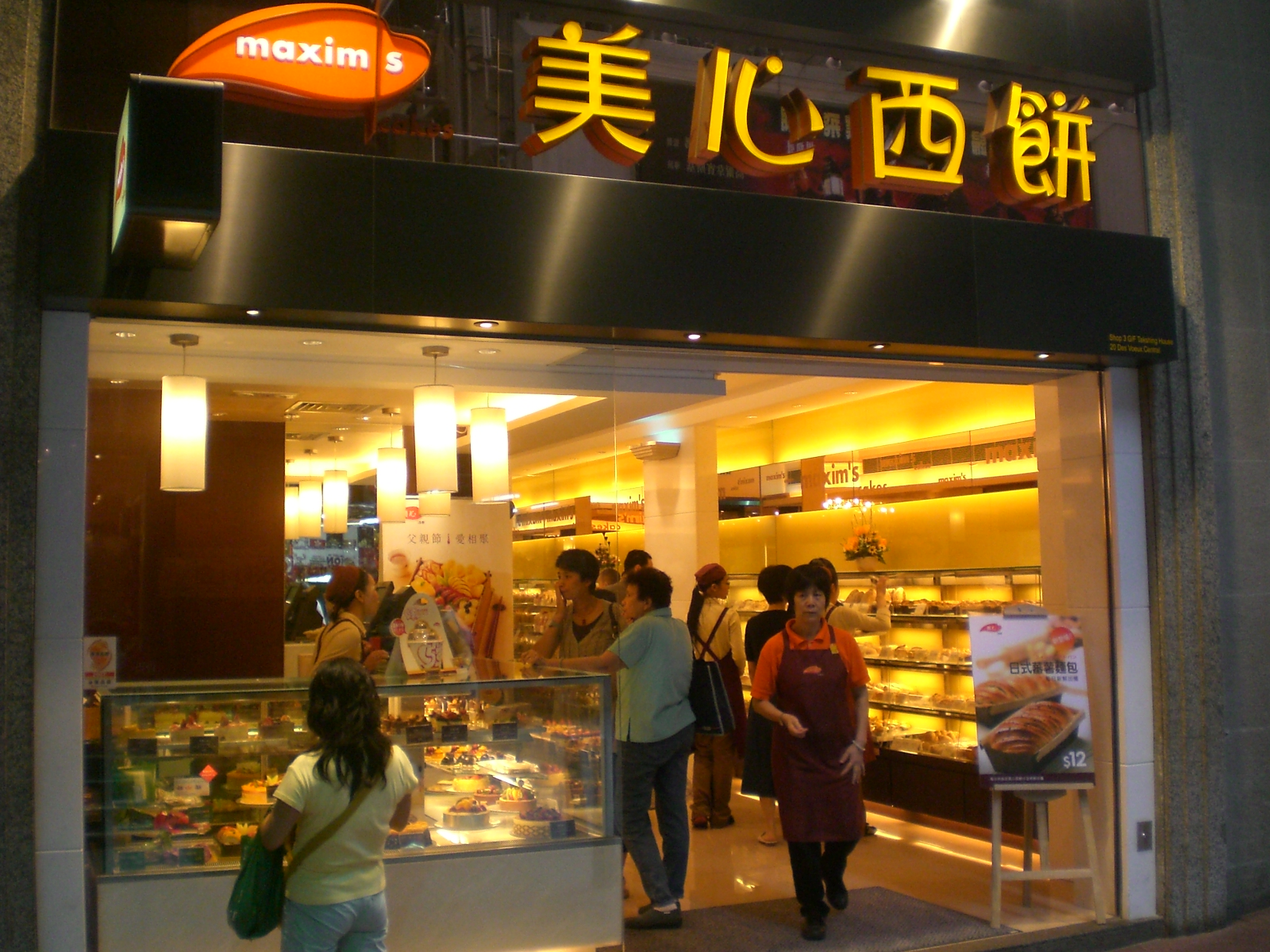 中文（香港）: 美心西餅中環戲院里分店